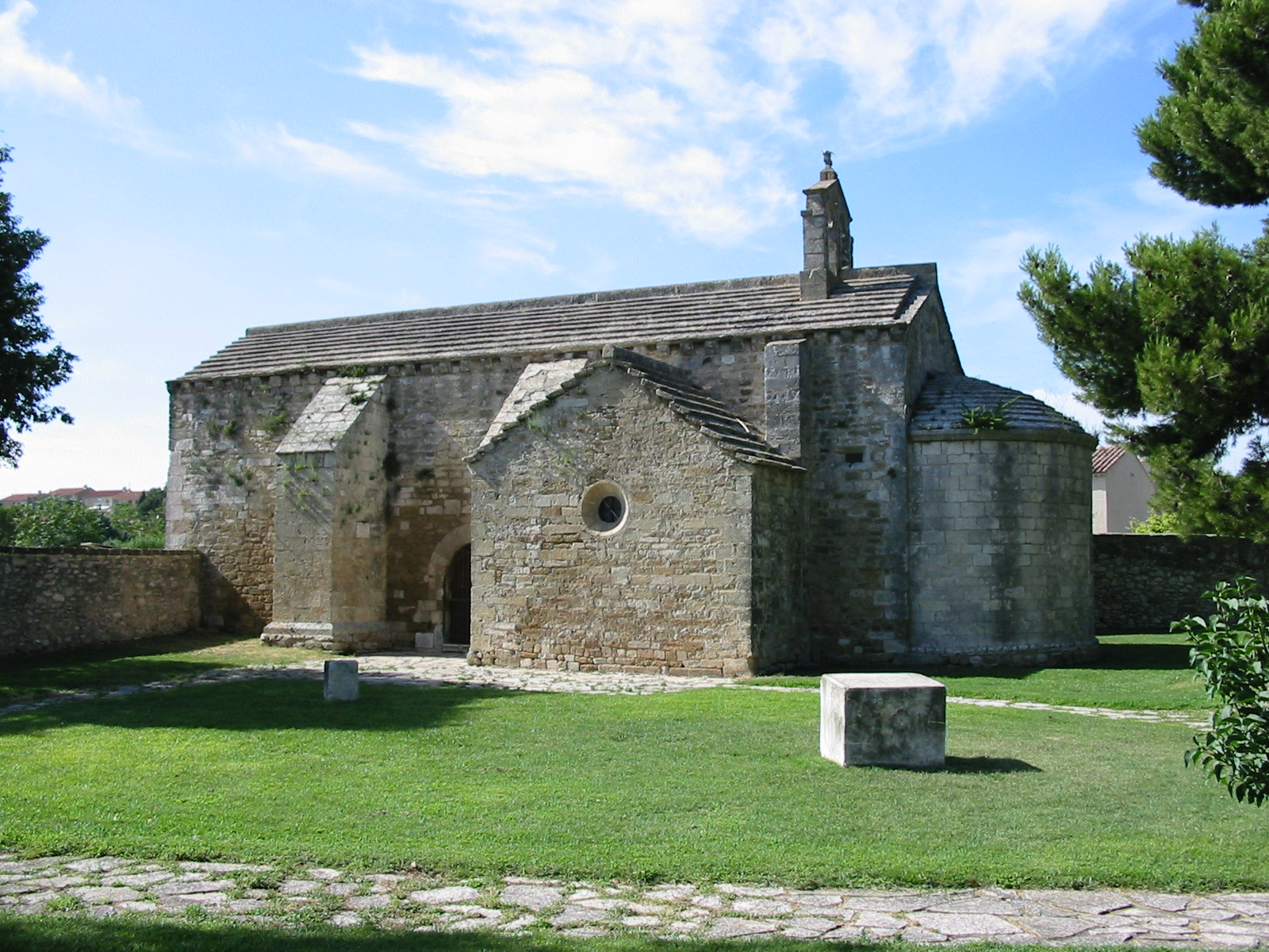 Chapelle Saint-Cyr (Lançon-Provence), XIIe siècle (?)